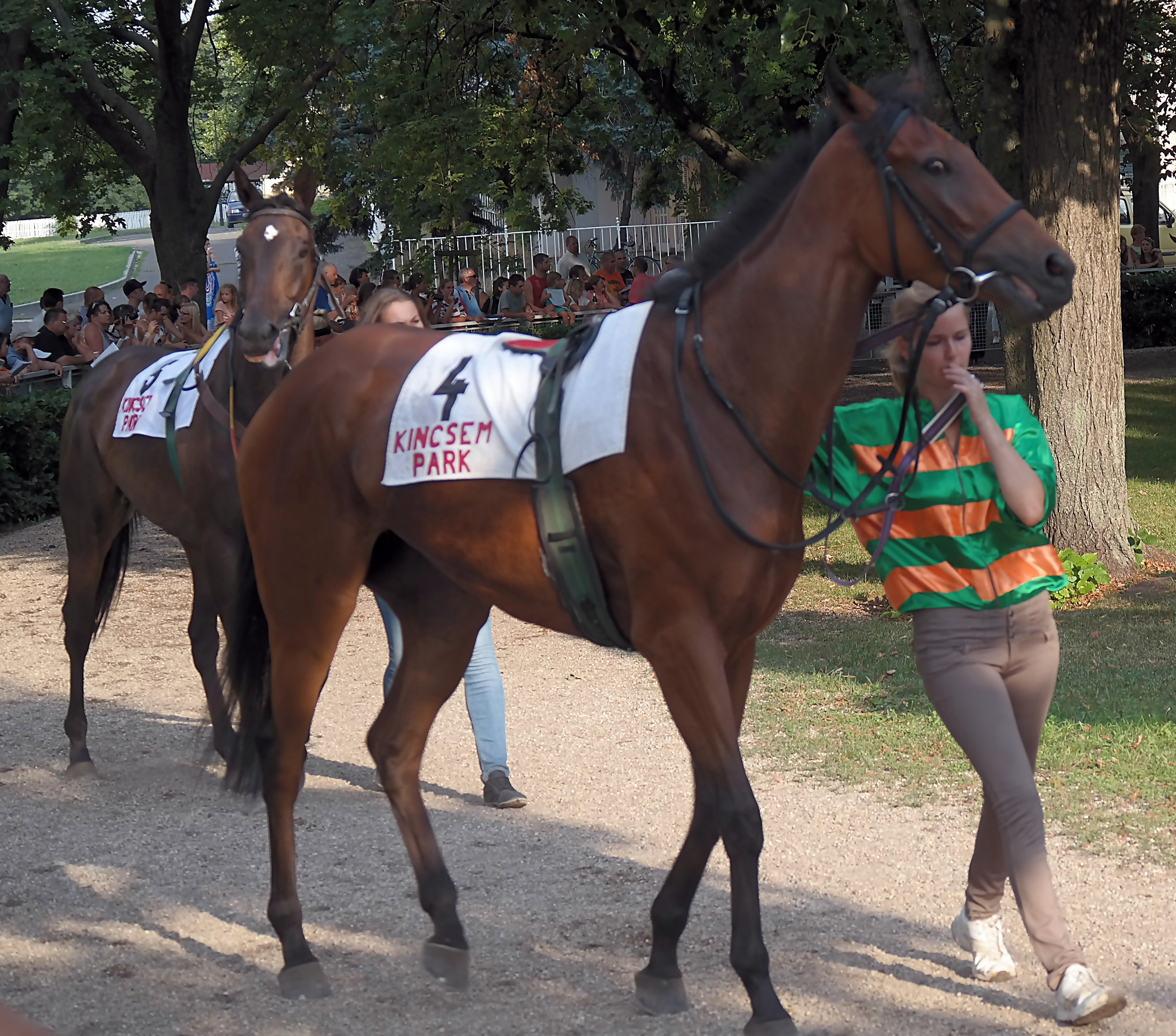 Magyar Kancadíj 2014. A második helyezett: Florhead